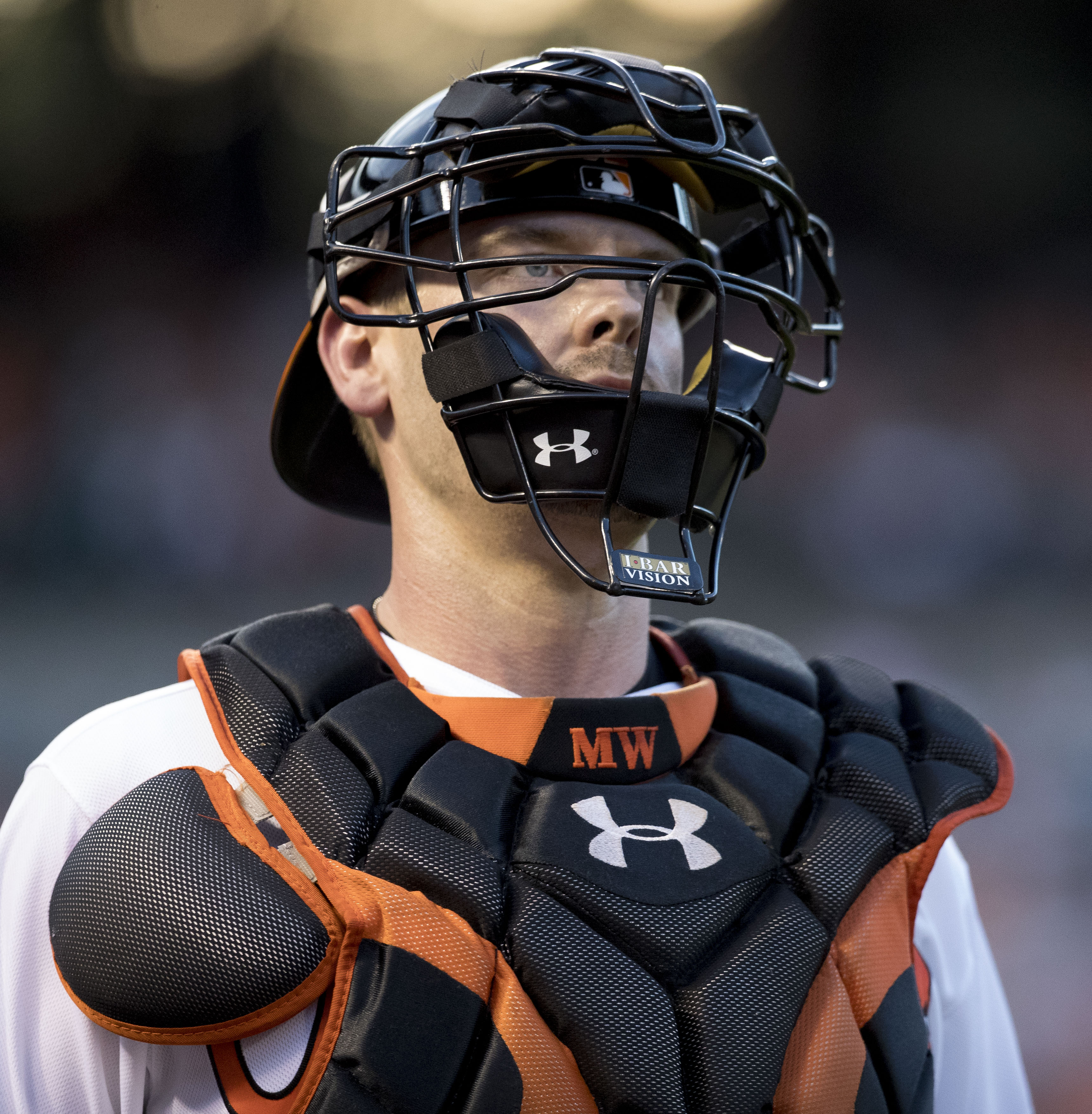 Astros at Orioles 8/18/16